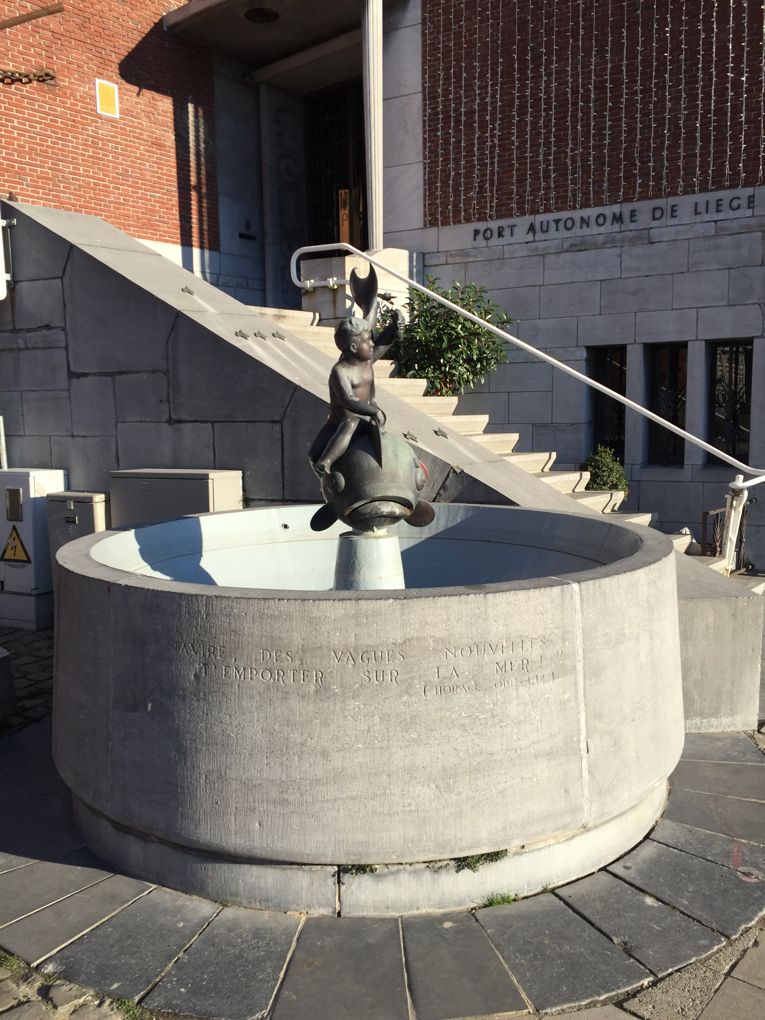 fontaine du PAL